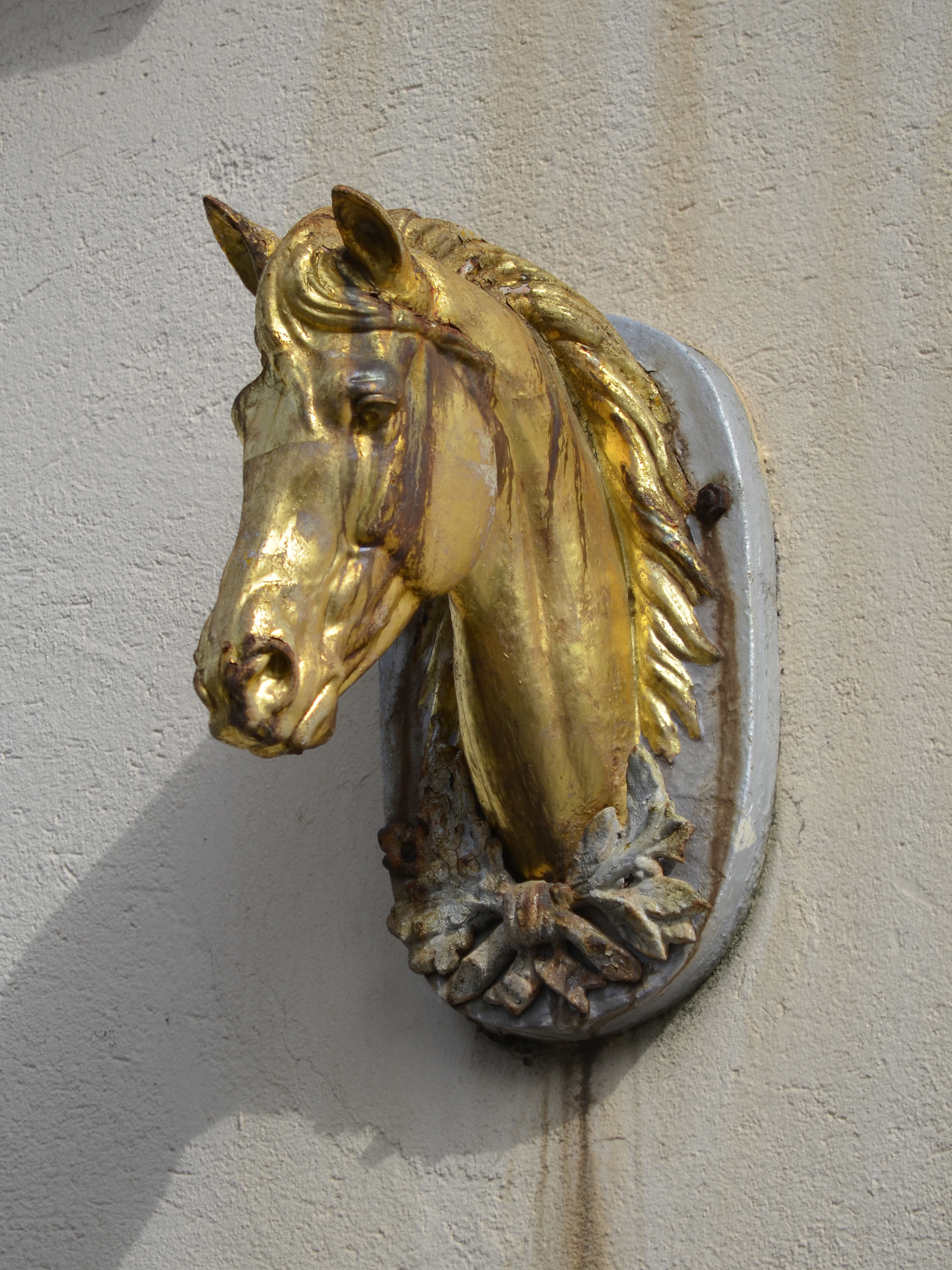 Devanture d'une ex-Boucherie Chevaline - Les Herbiers, Vendée